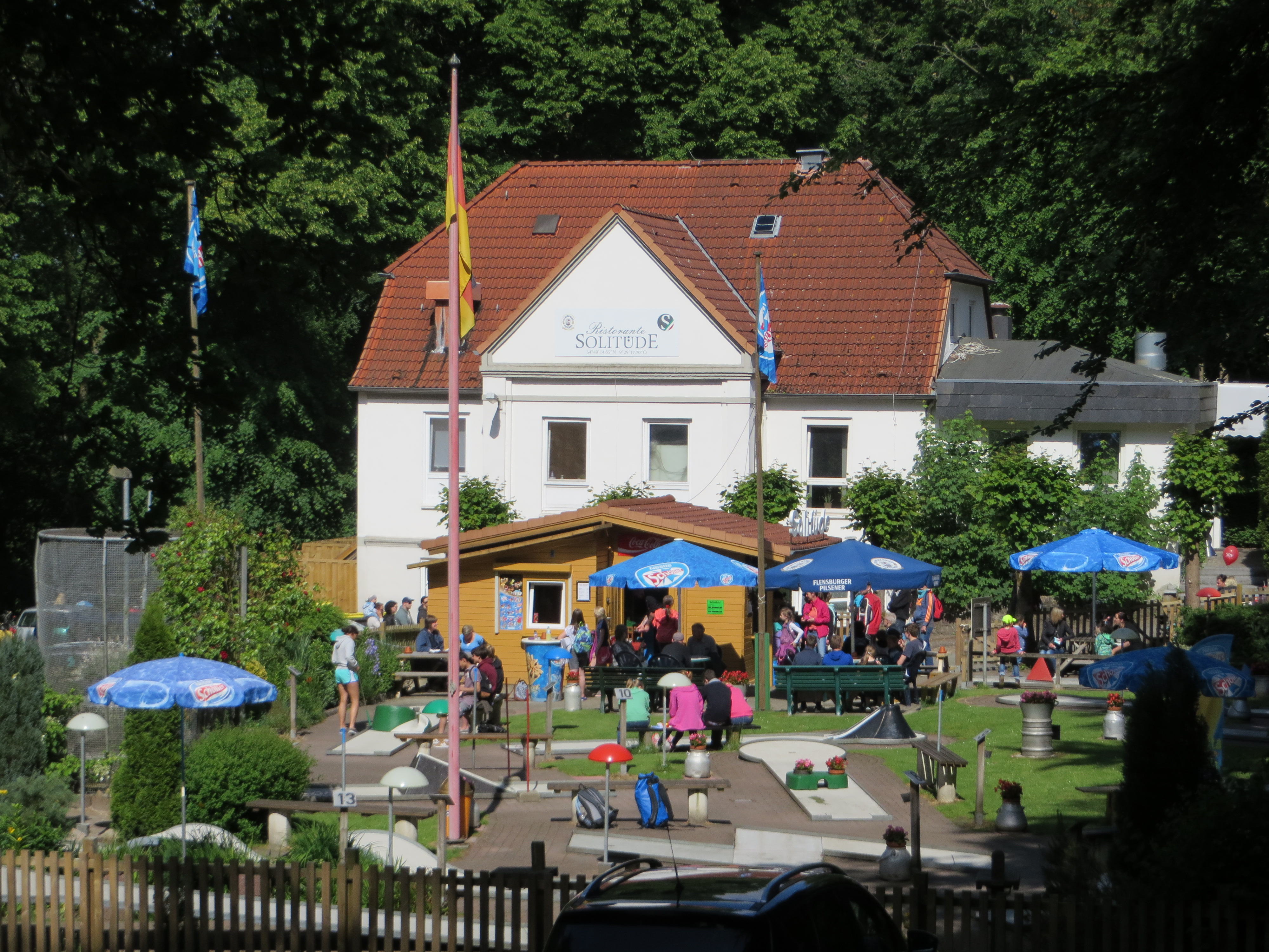 Gaststätte Solitüde (Flensburg-Mürwik Juni 2015), Bild 03